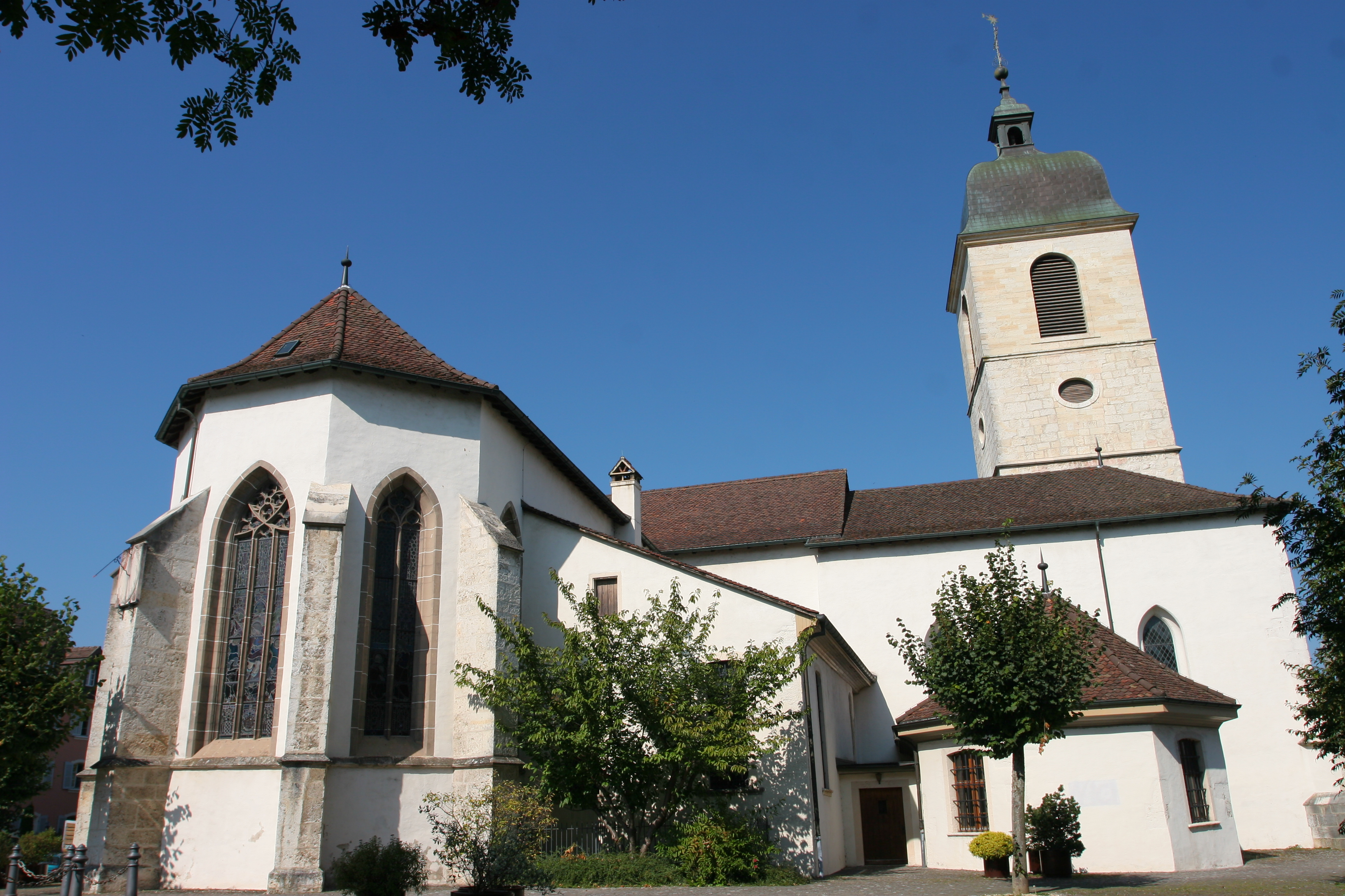 Vue extérieur, façade sud